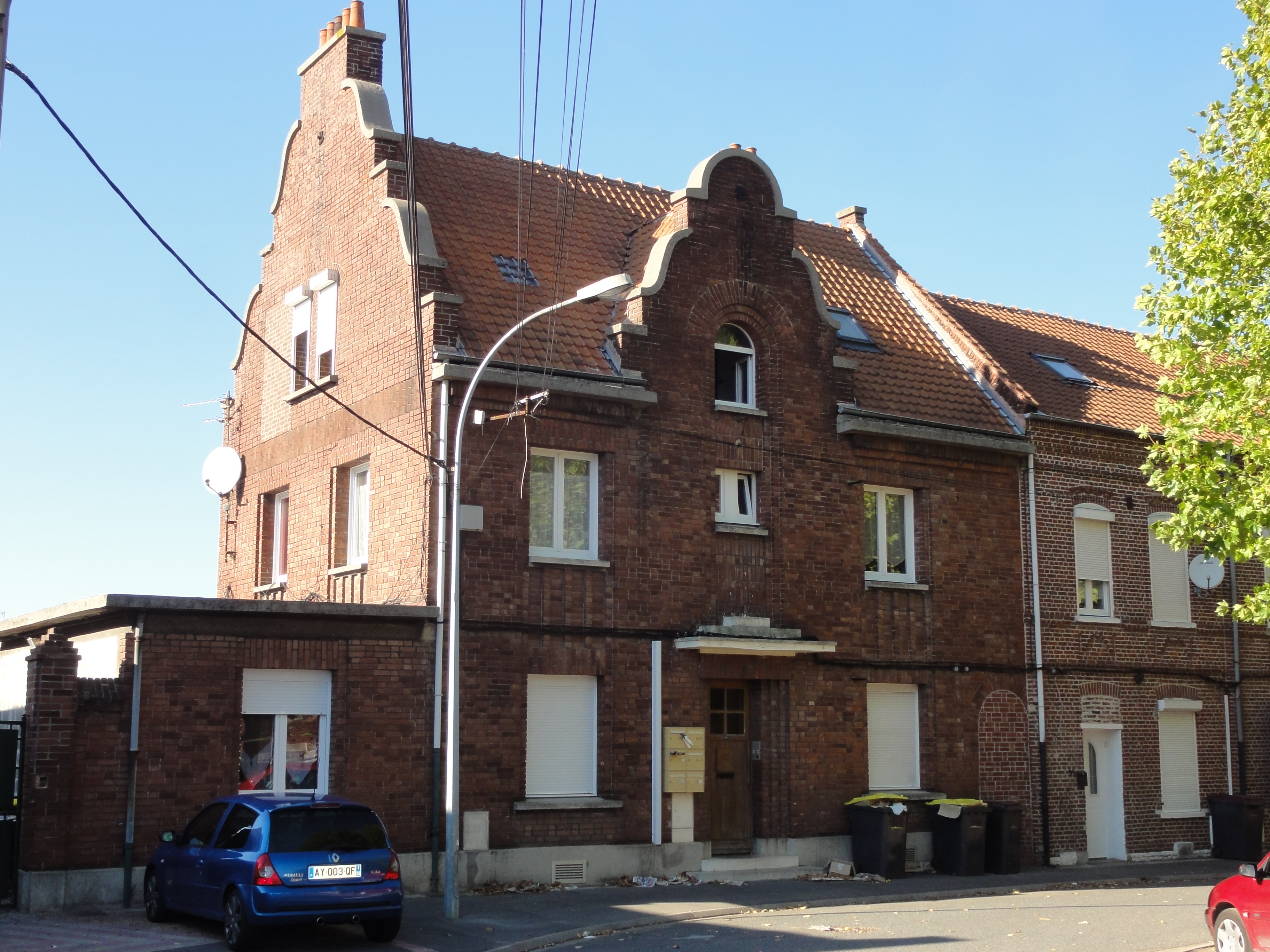 Presbytère français de l'église Saint-Louis des cités de la Fosse n° 2 de la Compagnie des mines de Drocourt, Rouvroy, Pas-de-Calais, Nord-Pas-de-Calais, France. .